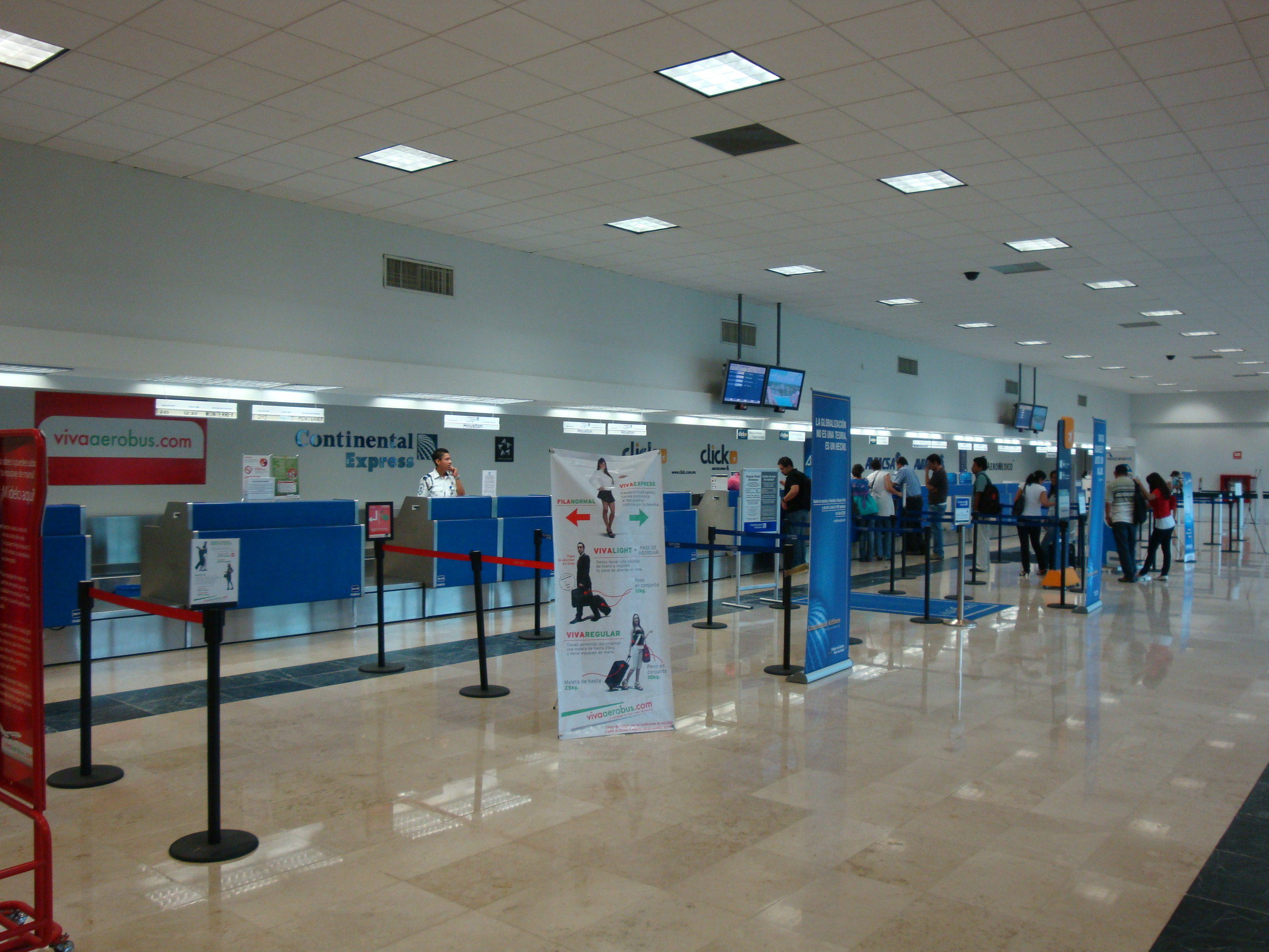 Mostradores del Aeropuerto Internacional de Villahermosa, Tabasco, México